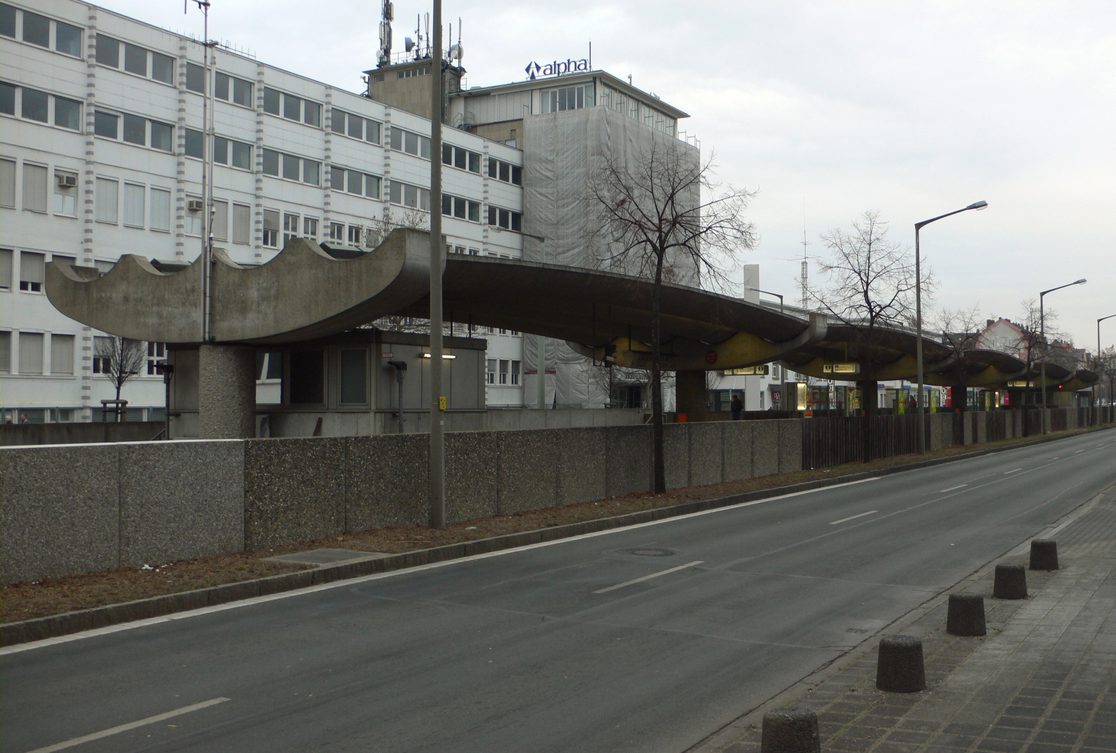 U-Bahnhof Eberhardshof der U-Bahn Nürnberg, Außenansicht, Blick von Südwesten